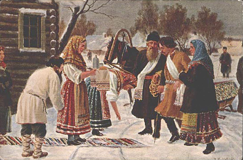 Приезд молодого от родителей в дом тестя за свадебный пир. Художник И.М. Львов. Открытка, изданная в 1912 г. в Москве И.Е. Селиным.